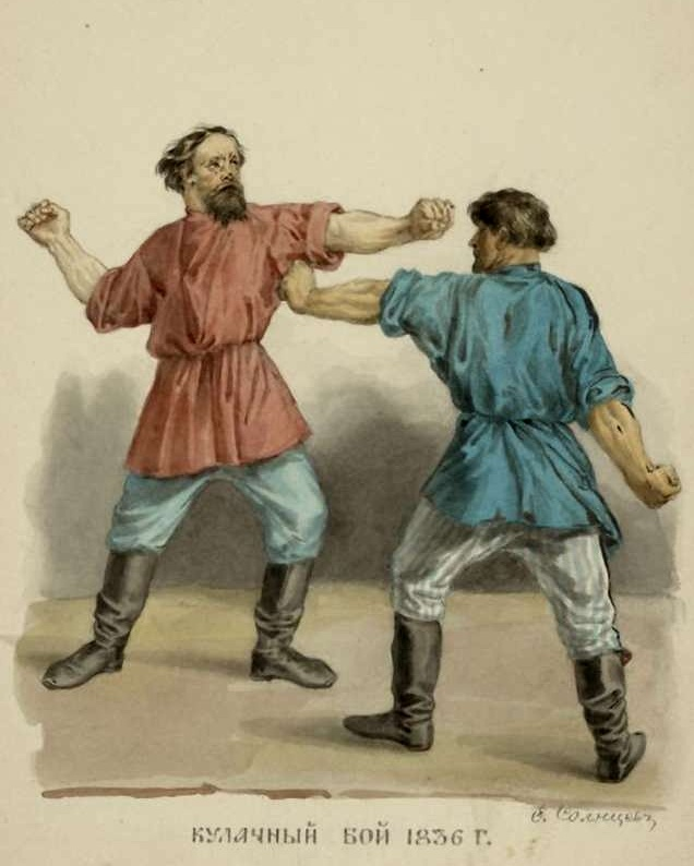 Кулачный бой. 1836 г.